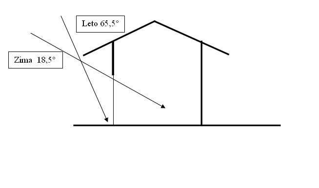 diagram slnečnýcg ziskov budou